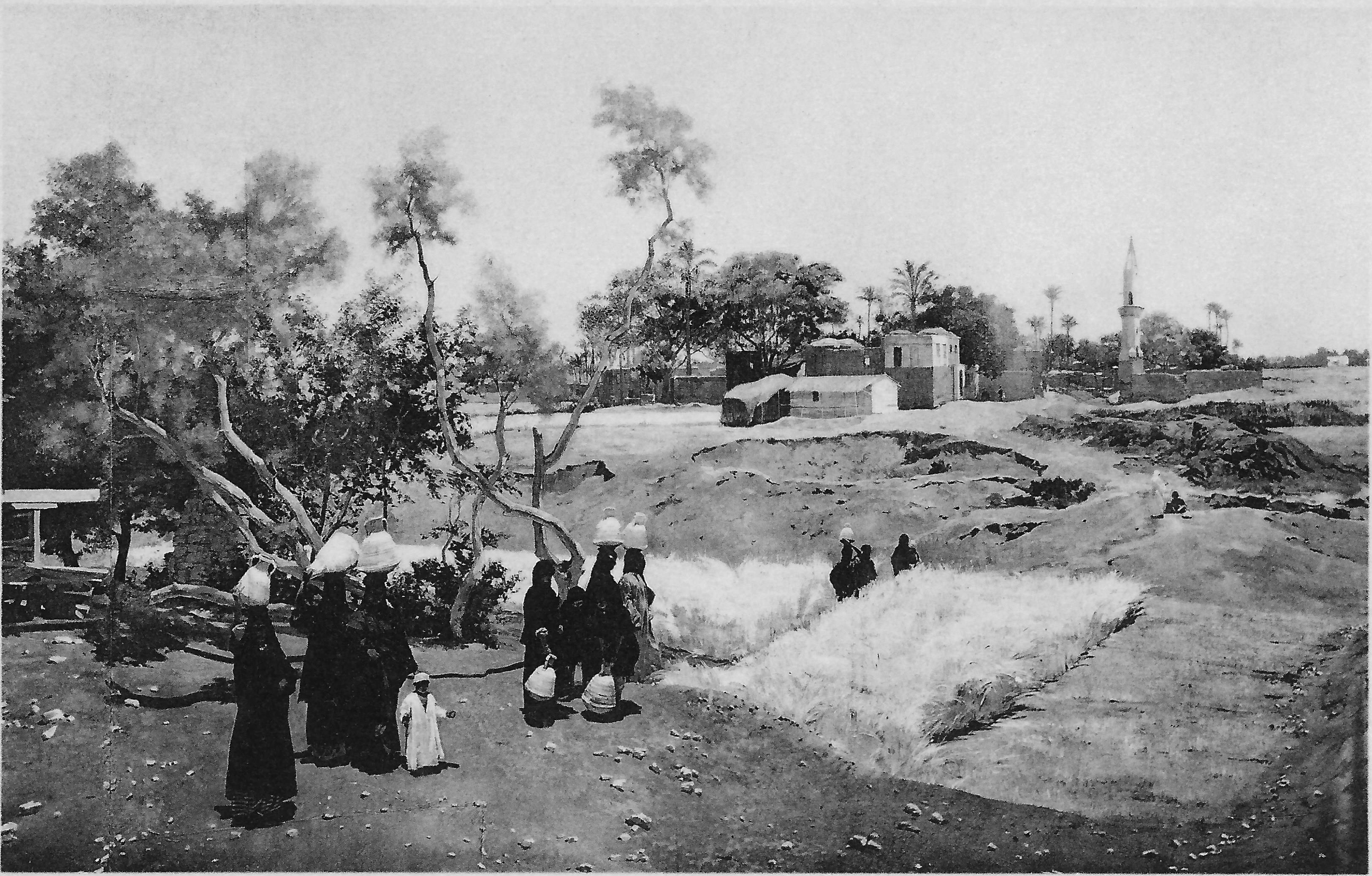 Een dorp rond Cairo waar vrouwen het water dragen